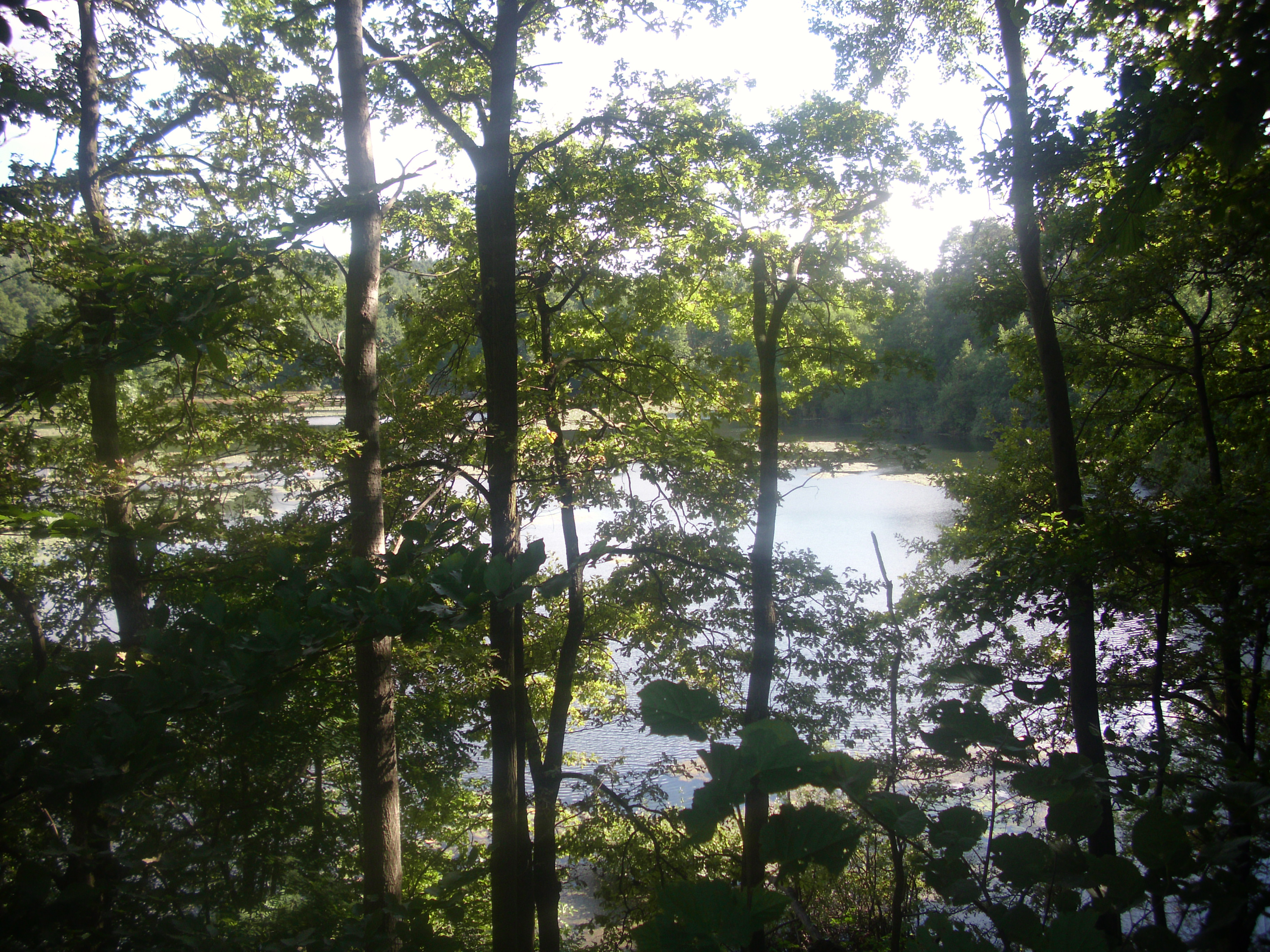 Stubbenloch, nahe Wirchensee im Naturpark Schlaubetal